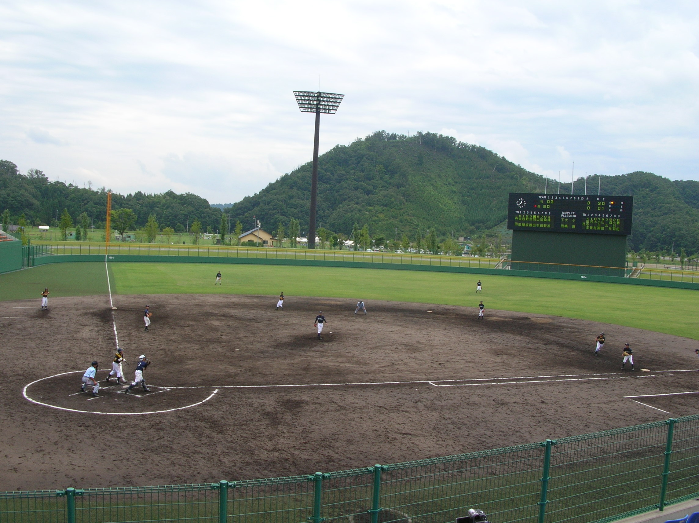 球場写真